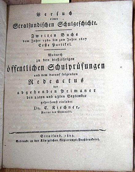 Versuch einer Stralsundischen Schulgeschichte. Zweiten Buchs vom Jahre 1560 bis zum Jahre 1617. Erste Partikel. Wodurch zu den dießjährigen öffentlichen Schulprüfungen und dem darauf folgenden Redeactus der abgehenden Primaner den 22ten und 23ten September gehorsamst einladet Dr. C. Kirchner, Rector des Gymnasii. Stralsund, 1823. Gedruckt in der Königichen Regierungs-Buchdruckerei